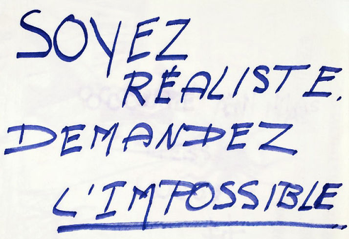 Sciences-Po : "Soyez réalistes, demandez l'impossible" - Manuscrit, 27 x 21 cm - BnF, département Philosophie, histoire, sciences de l'homme, Lb61-600 (Tracts mai 1968).